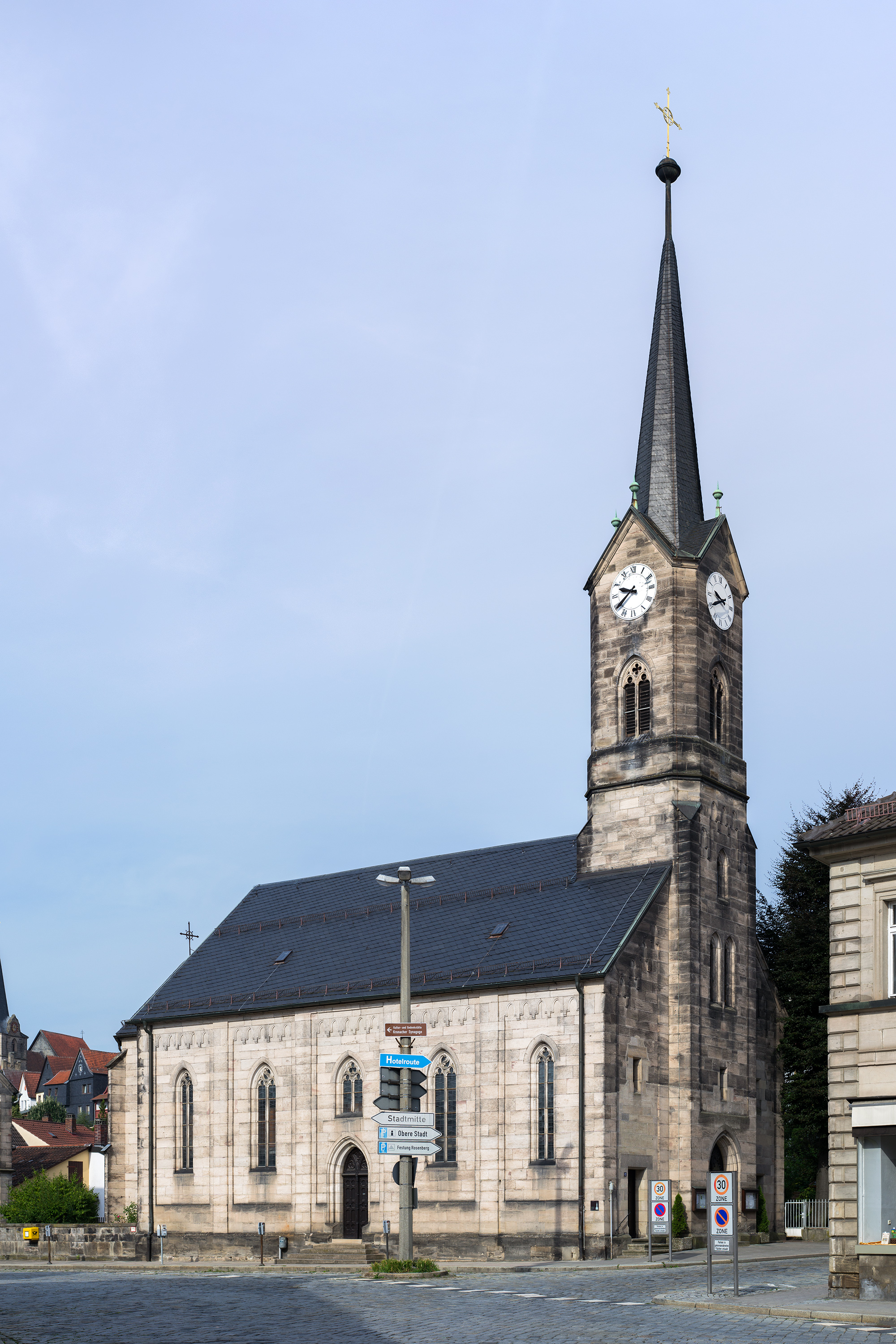 Evangelisch-Lutherische Christuskirche in der Strauer Straße in Kronach.